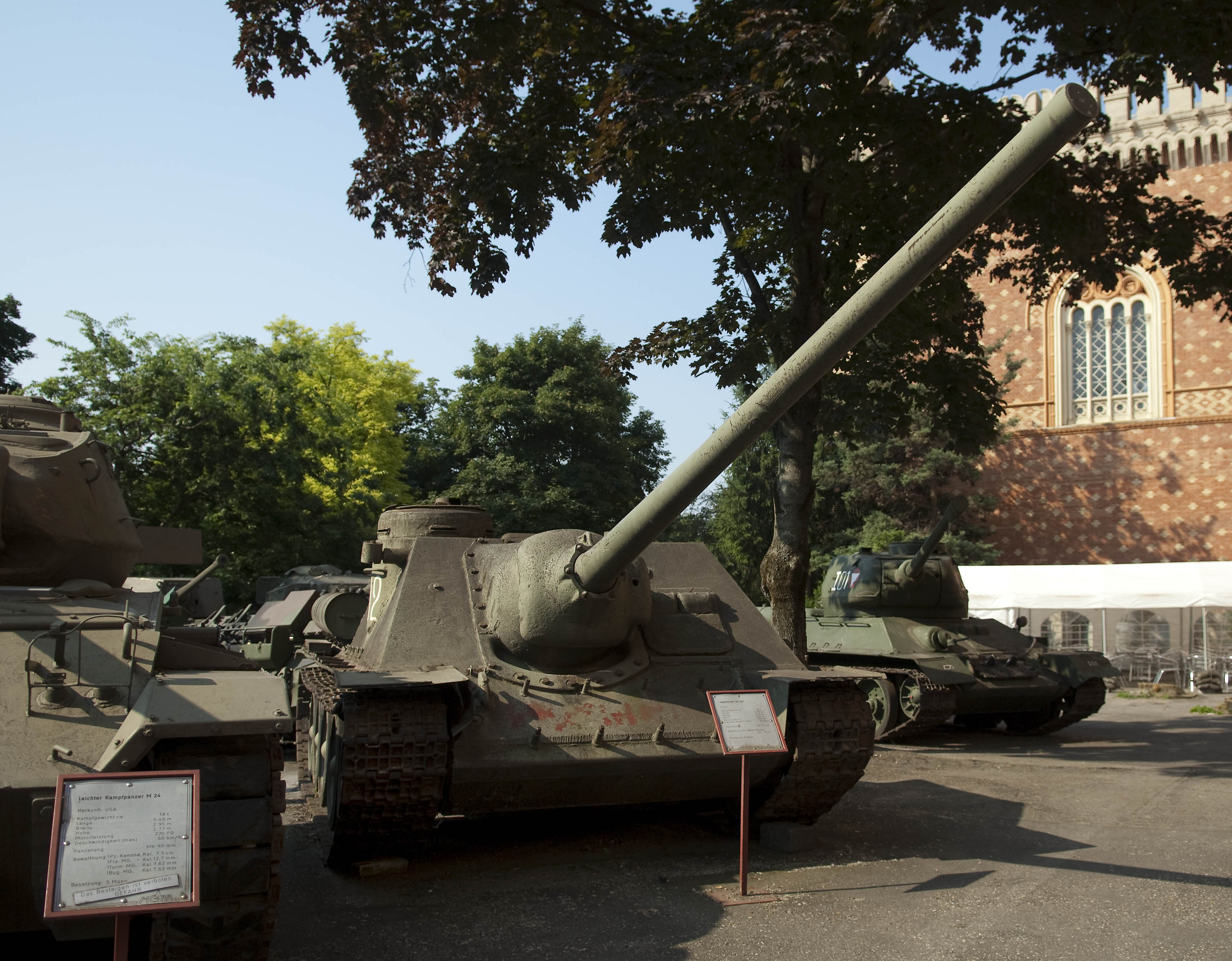 Sowjetischer Jagdpanzer SU-100 im Panzergarten des Heeresgeschichtlichen Museums in Wien